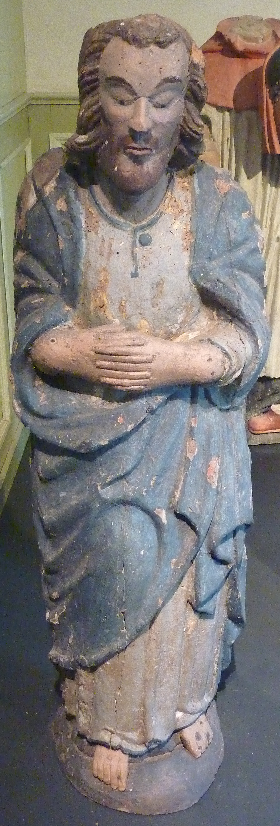 Plougastel-Daoulas : chapelle Saint-Languis, statue de saint Languis, appelé aussi saint Diboan (bois polychrome, XVIe siècle). Saint Languis était invoqué pour obtenir la guérison d'enfants atteints de langueur (affaiblissement). Le fidèle trempait un vêtement du malade dans la fontaine et retournait à la chapelle pour prier le saint, après avoir allumé un cierge. Ensuite, le fidèle plaçait le vêtement encore humide sur le corps de l'enfant et attendait sa guérison ou sa mort.